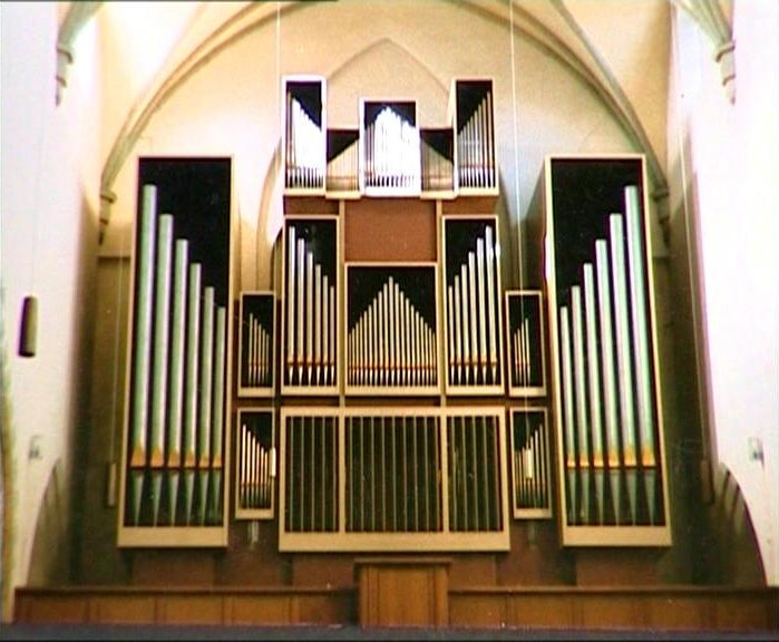 Die alte Walcker-Orgel in St. Martin zu Memmingen (1962-1998)